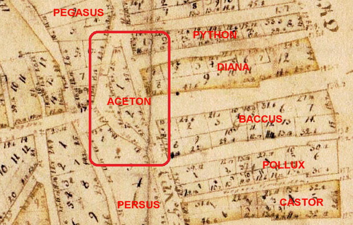 Del av "Grundritning och Charta Stockholm Stad" visande kvarteret Aceton